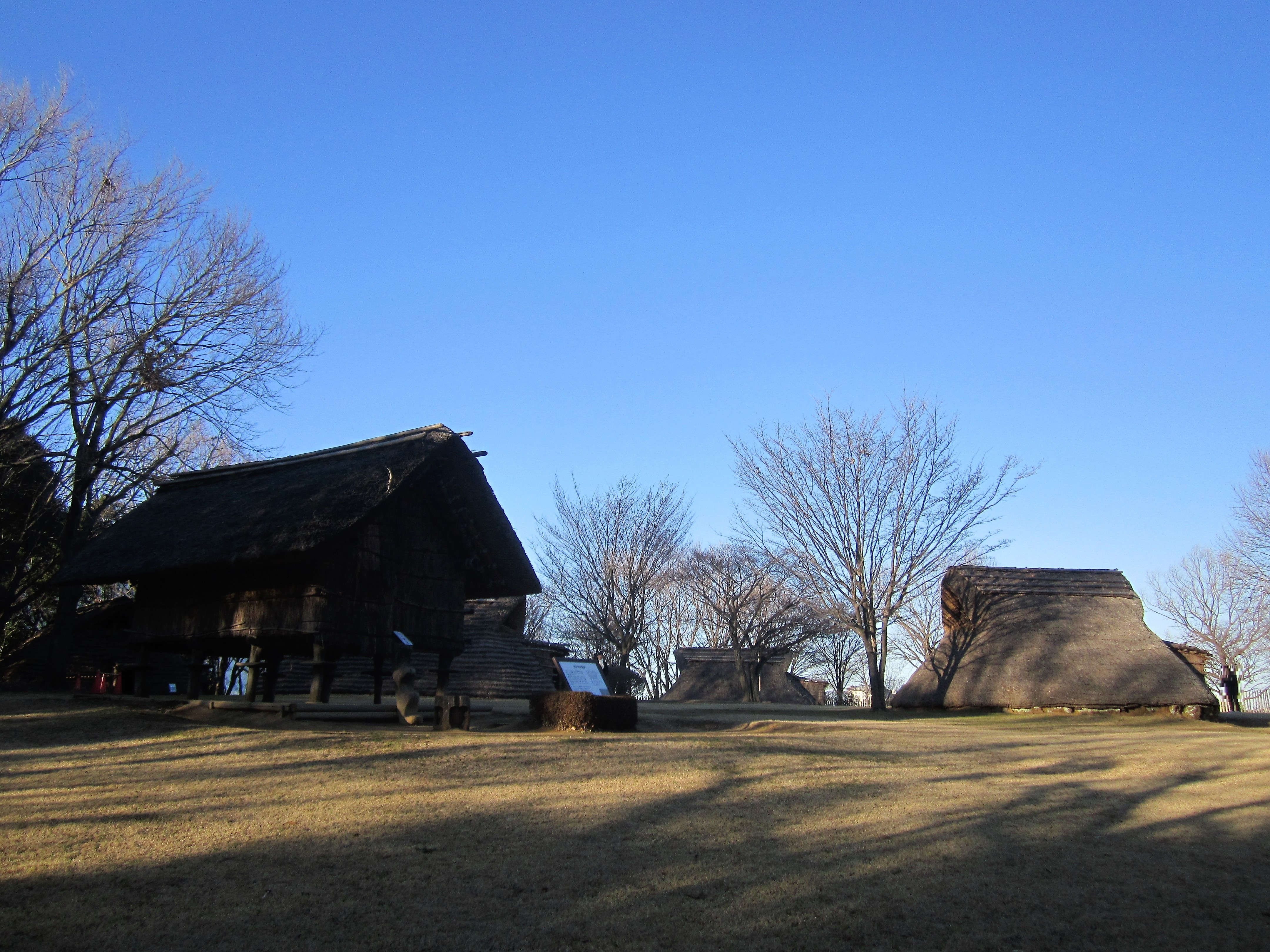 大塚遺跡（横浜市都筑区）